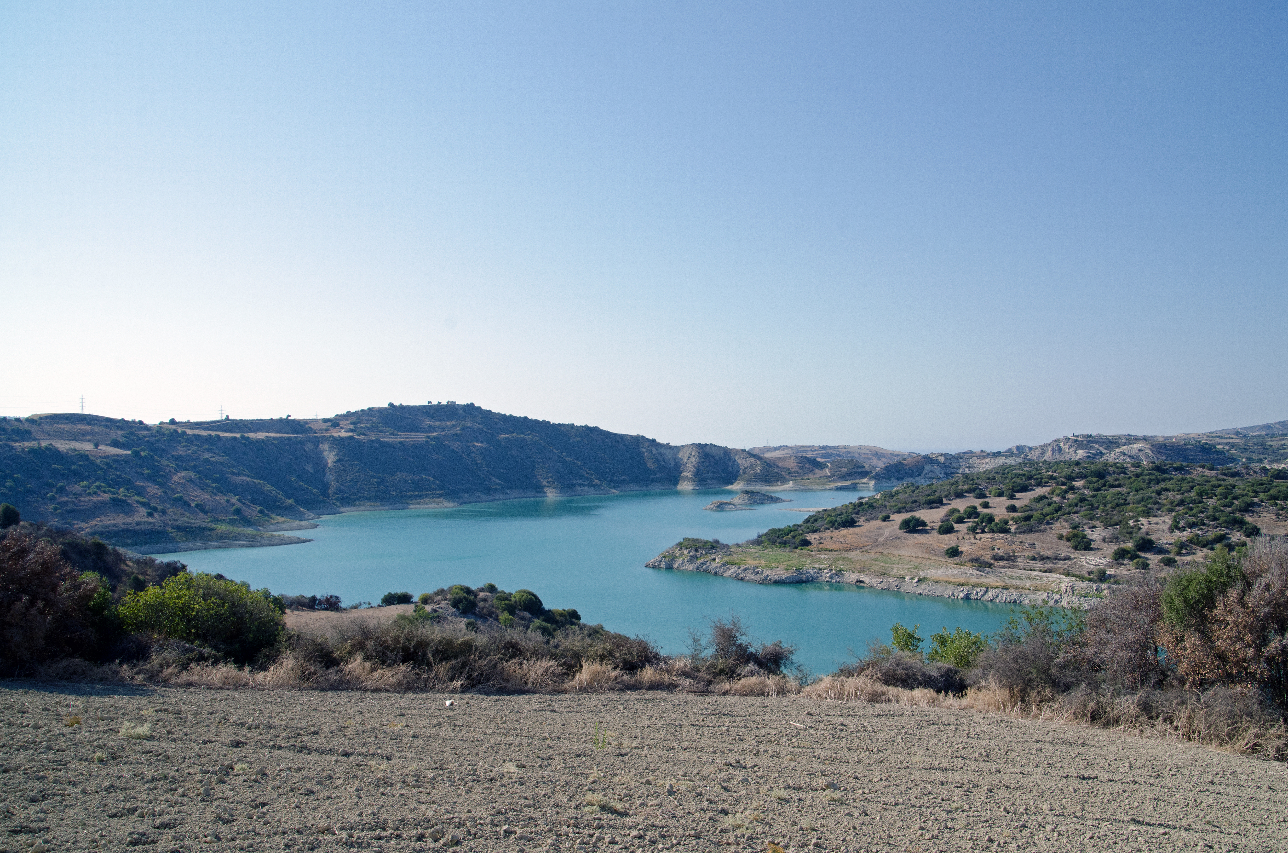 Evretou Dam, Paphos, Cyprus